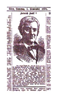 Johann Heinrich Knöll, Bezirksvorsteher von Favoriten (1884-1887)